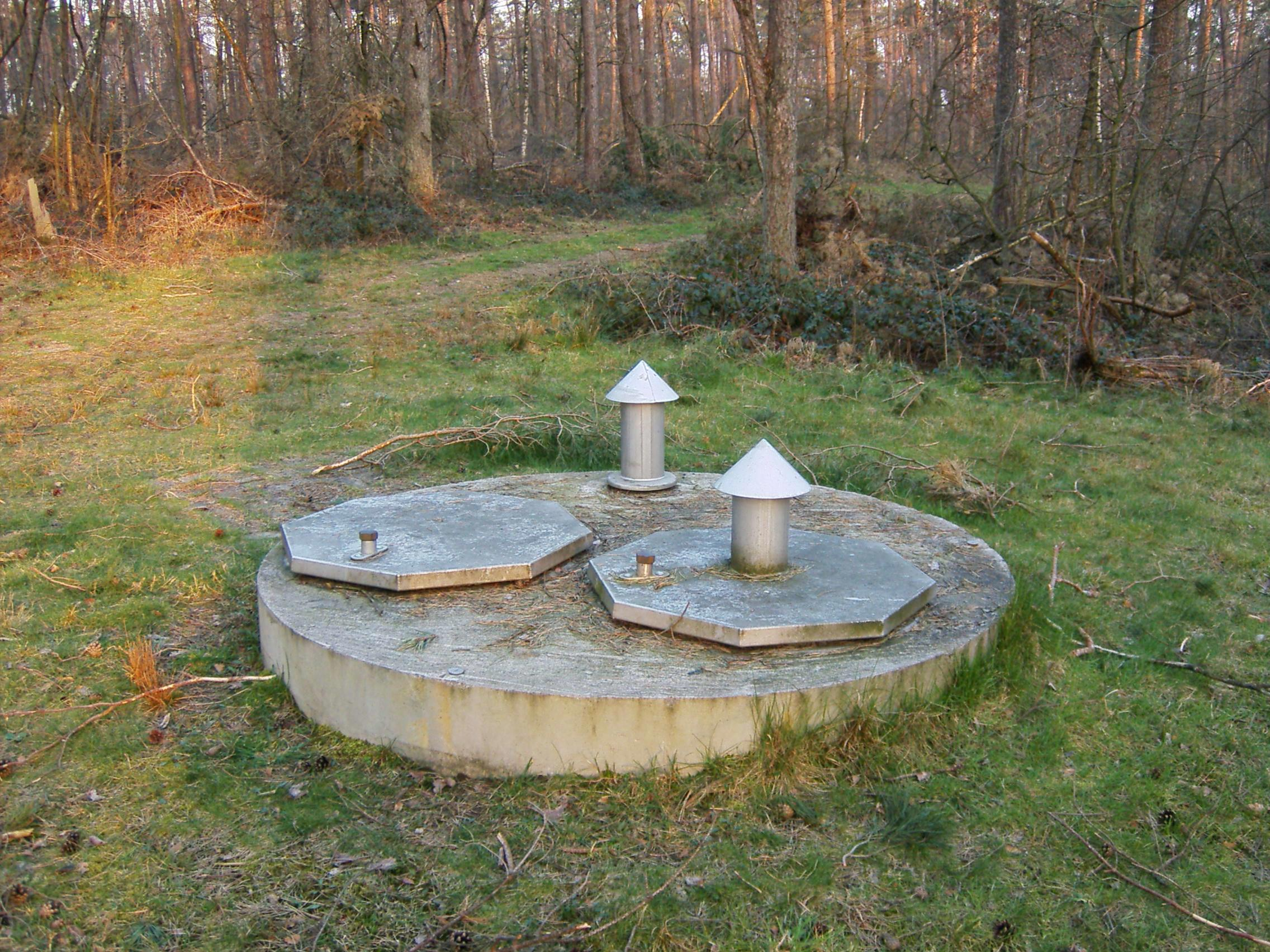 Trinkwasserbrunnen auf dem Kiessandzug in Offlum. Neuenkirchen (Kreis Steinfurt) Förderbrunnen der Stadtwerke Ochtrup ca. 500 m nordwestlich des Offlumer See.